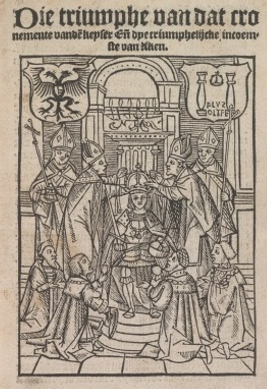 Konigs-Krönung Karls V. 1520 im Aachener Dom